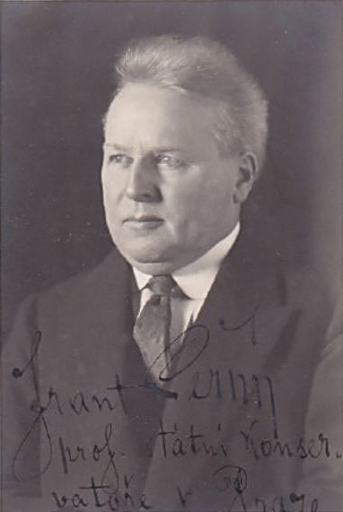 František Černý (1861 – 1940), Český kontrabasista a hudební skladatel.